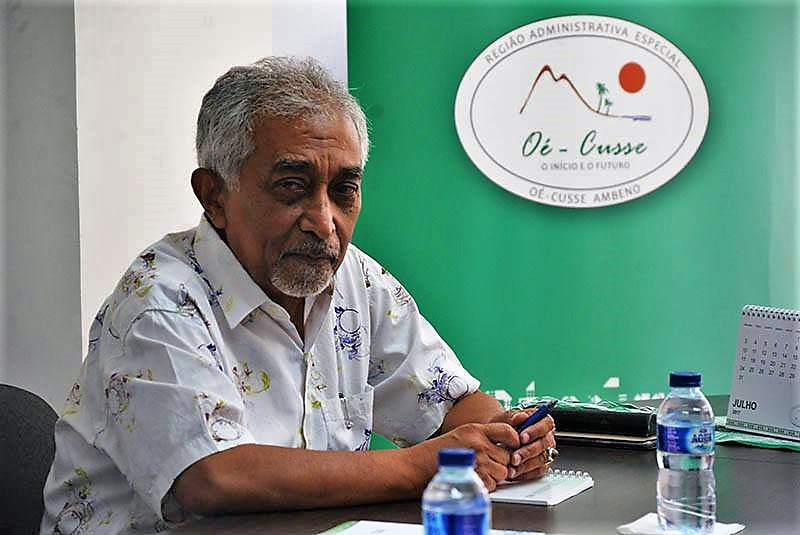 Marí bin Amude Alkatiri vor dem Logo der Sonderregion Oecusse